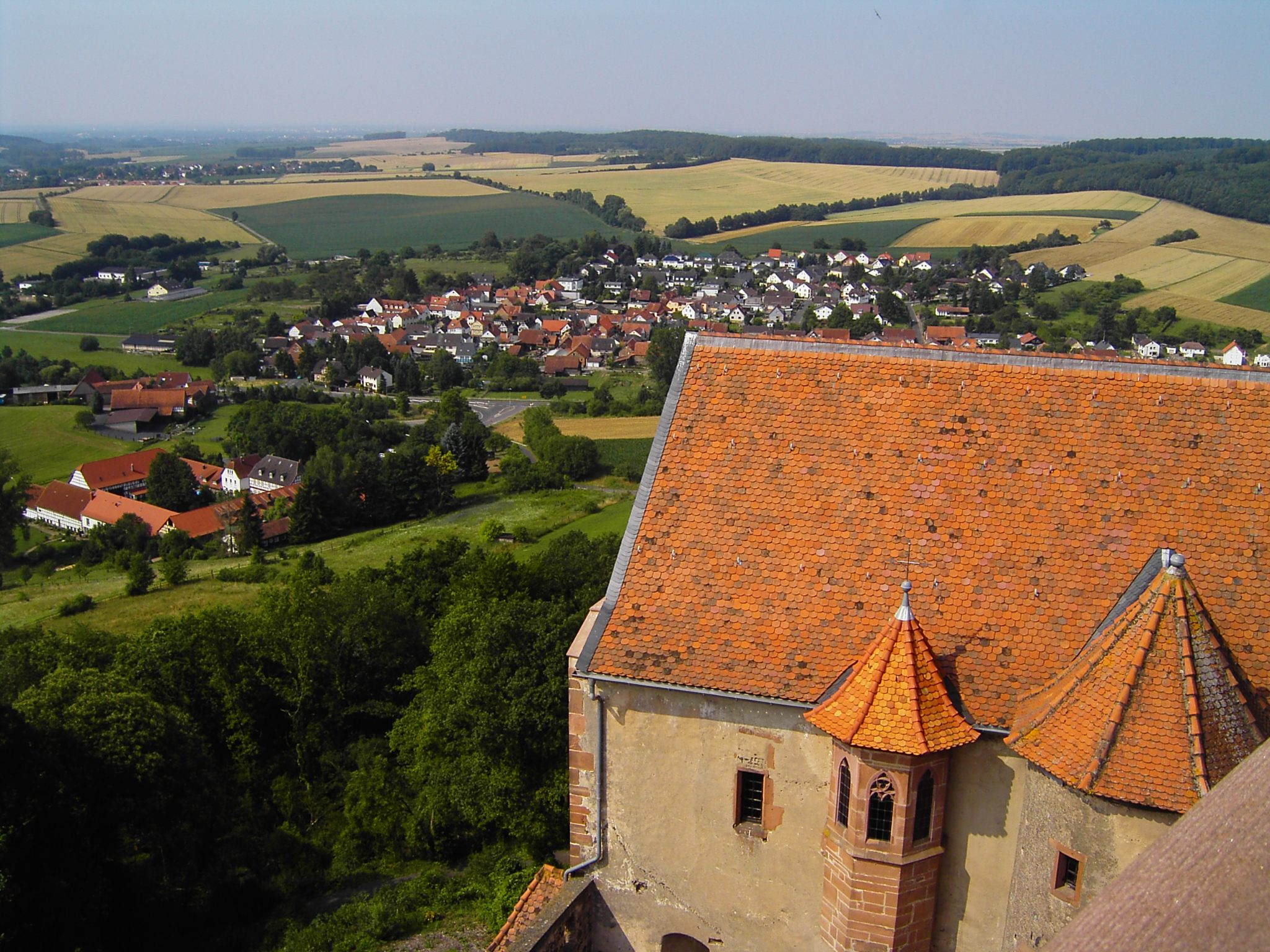 Ronneburg